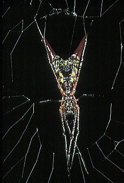 Micrathena sexspinosa from Costa Rica.